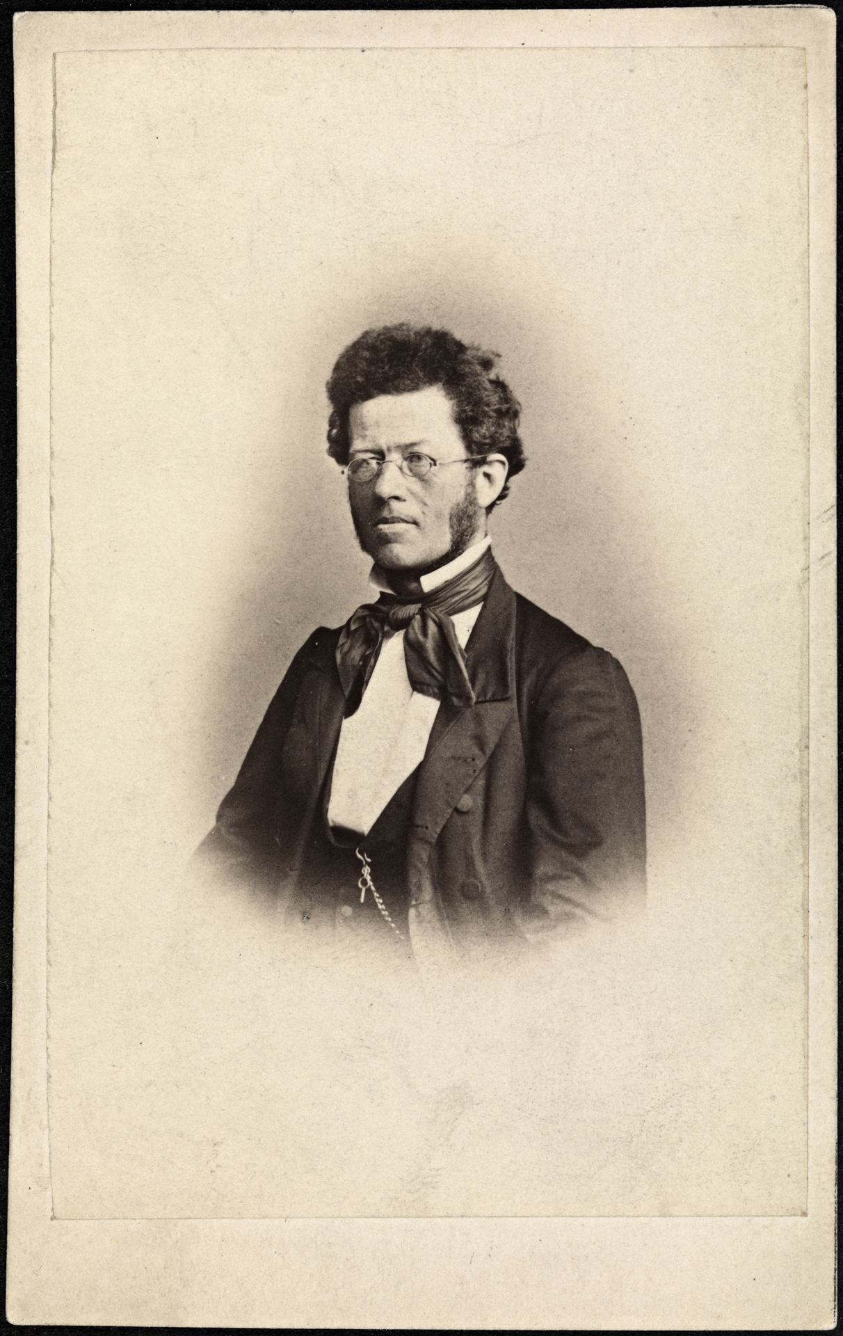 Portrett av Eilert Sundt, (1817-1875)